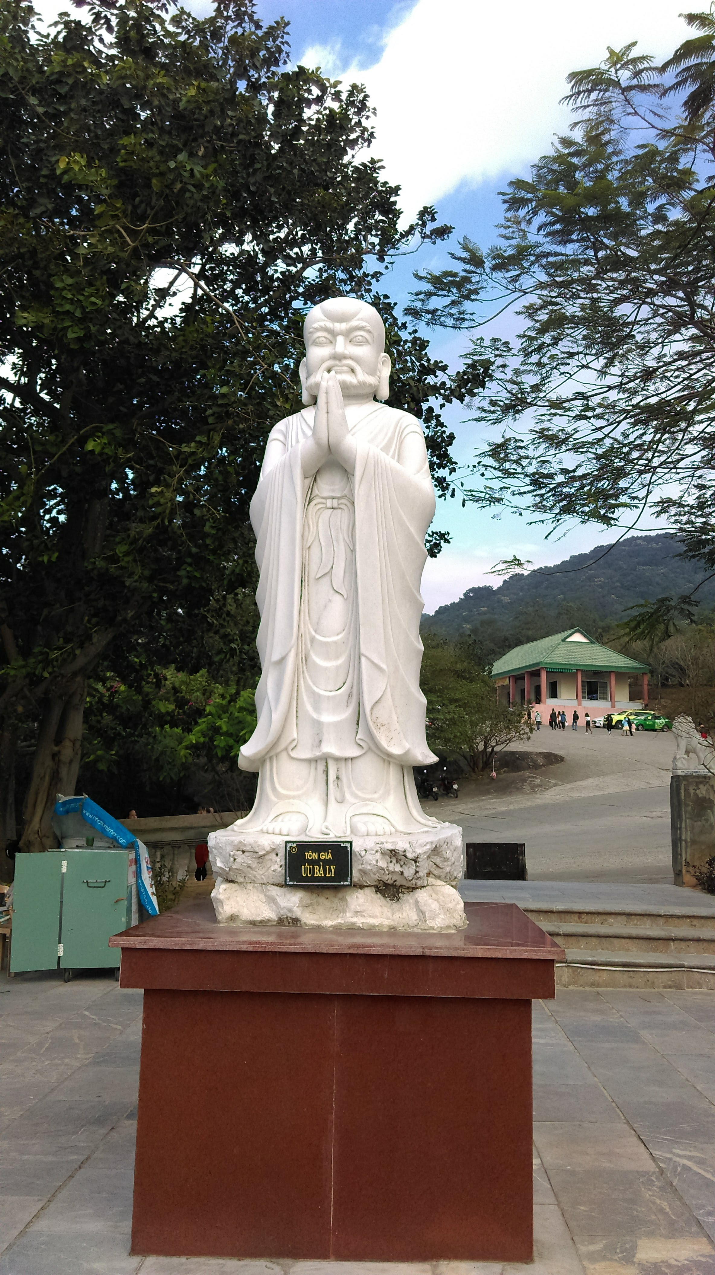 Ưu Bà Ly, chùa Linh Ứng Sơn Trà, Đà Nẵng